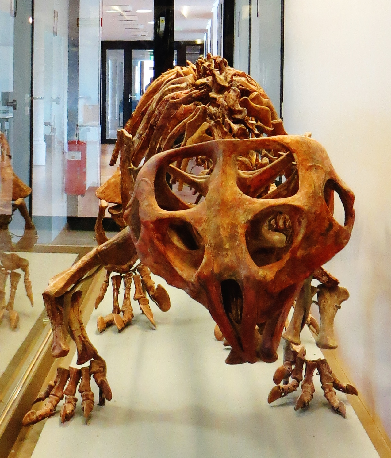 Fossil of Hyperodapedon, an extinct reptile- Took the picture at Museum of Paleontology, Tuebingen